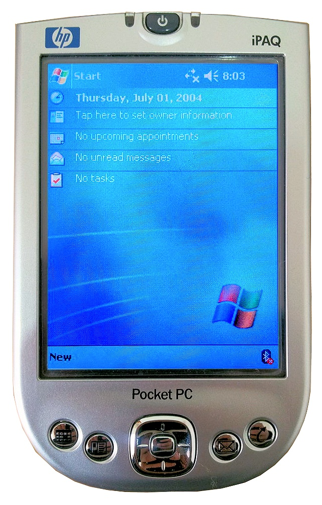 HP iPAQ 4150